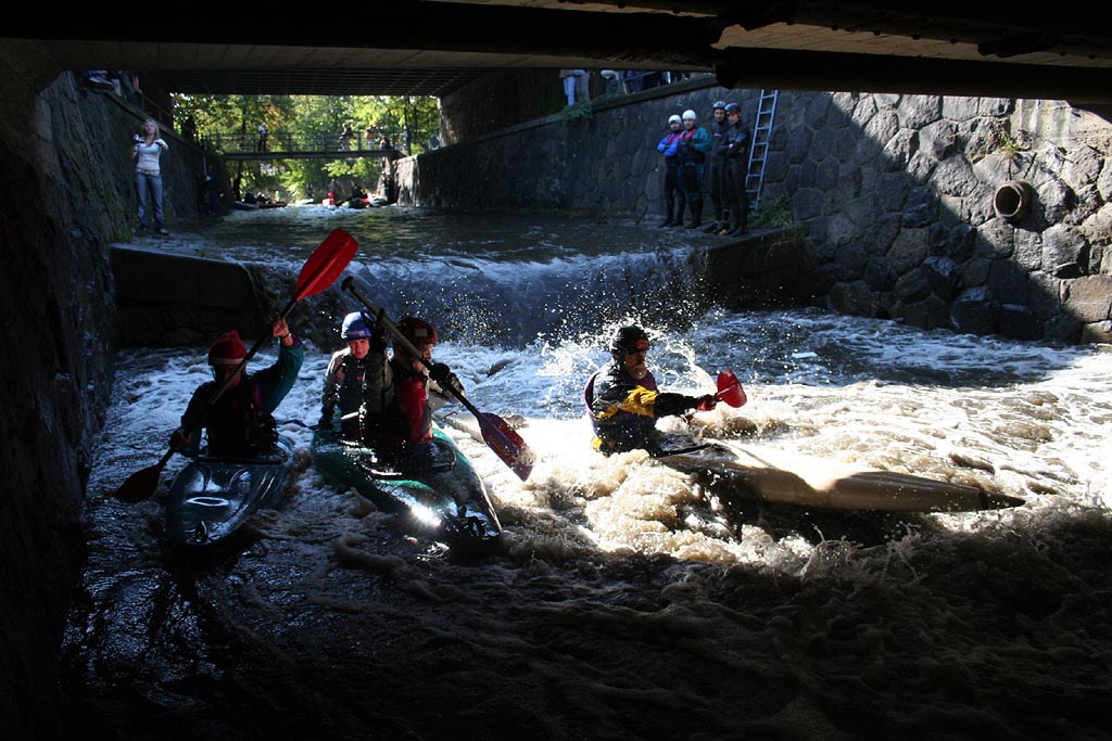 Tři lodě sjíždějí jez na Botiči v Praze 10 - Vršovicích